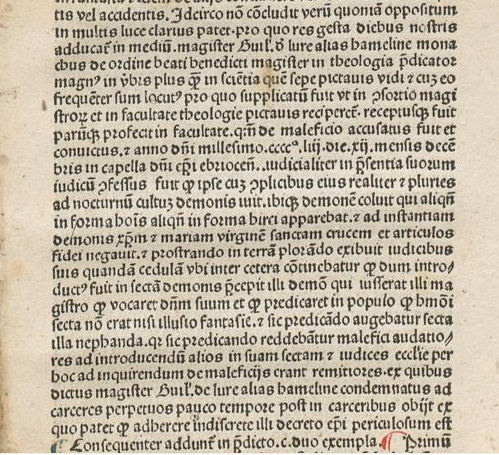 Abbildung einer Seite aus dem Buch "Flagellum maleficorum"